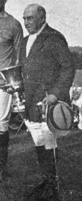 Le comte Jean de Magre en septembre 1933 (ici vainqueur de la Coupe de Gramont de polo de Deauville, avec trois officiers français). Vice-champion olympique de polo en 1900, avec l'équipe mixte du BLO Polo Club Rugby.